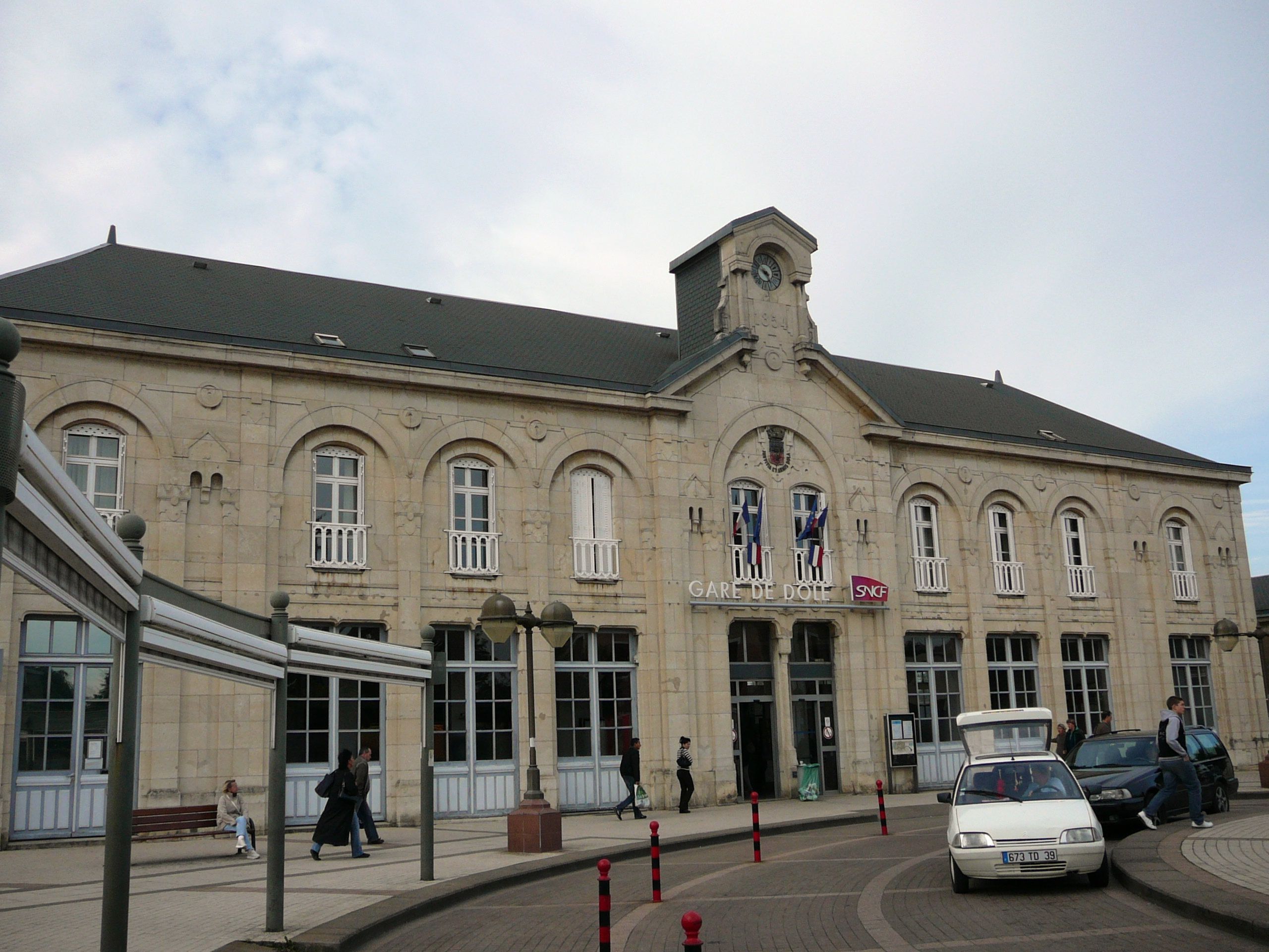 Cour de la gare de Dole